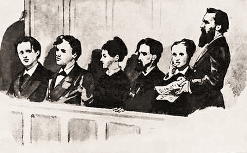 I pervomartovcy visti da un illustratore della polizia